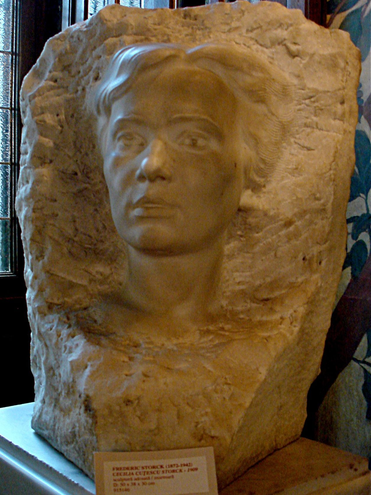 Cecilia Cuțescu-Storck (1909) - Portret de Frederic Storck expus la Muzeul de Artă Frederic Storck și Cecilia Cuțescu-Storck. Frederic Storck (1872–1942) Alternative names Friedrich Storck, Fritz StorckDescriptionRomanian sculptorDate of birth/death 10 January 1872 26 December 1942 Location of birth/death Bucharest BucharestAuthority control : Q368977 VIAF: 96120065 ULAN: 500064165 GND: 1175921076 RKD: 434323 creator QS:P170,Q368977